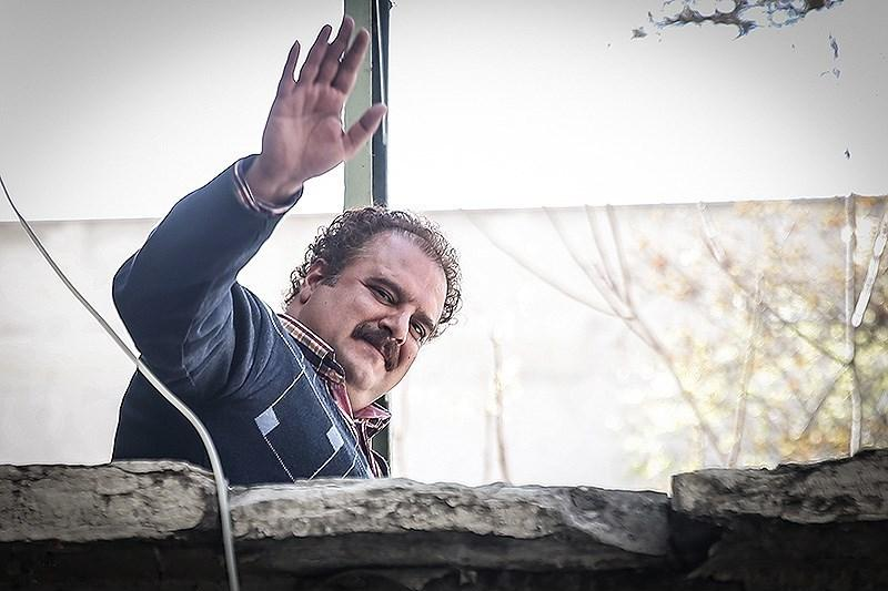 پشت صحنه مجموعه تلویزیونی دودکش دو